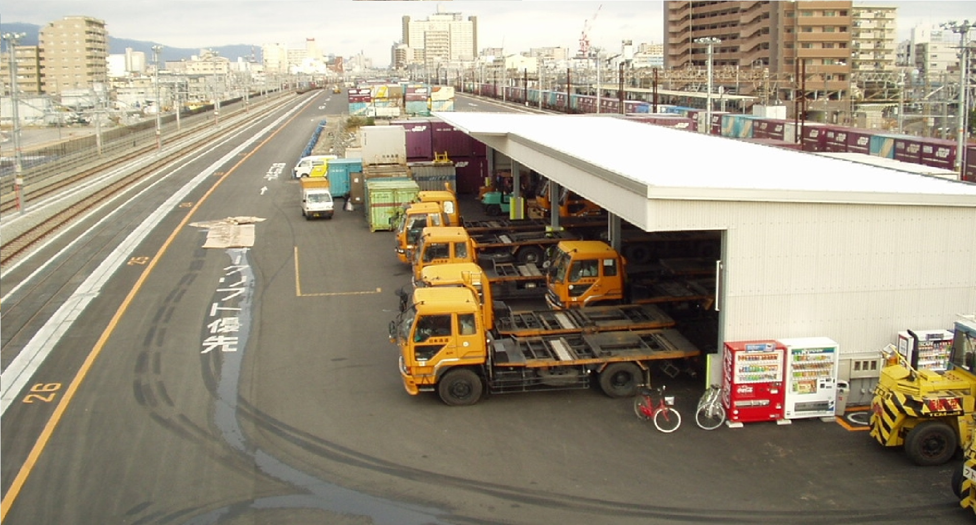 神戸貨物ターミナル駅の荷捌き施設と、コンテナホーム。